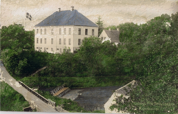 Det Hvide Palæ samt den ene sidelænge